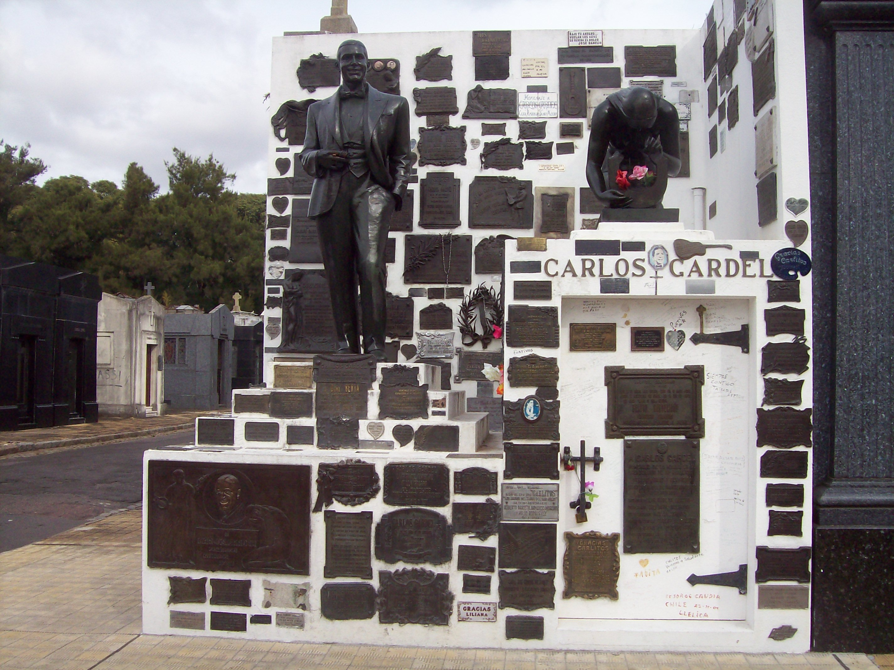 Sepulcro de Carlos Gardel